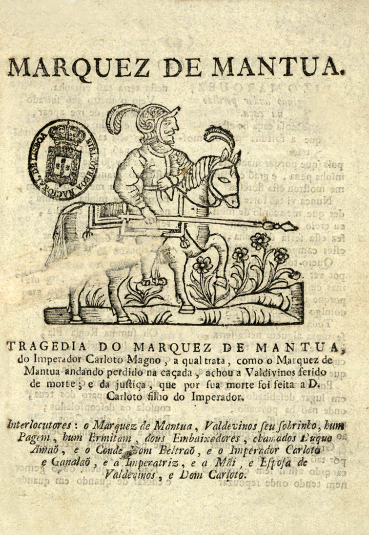 Marquez de Mantua, de Baltasar Dias, Lisbonne, 1789.